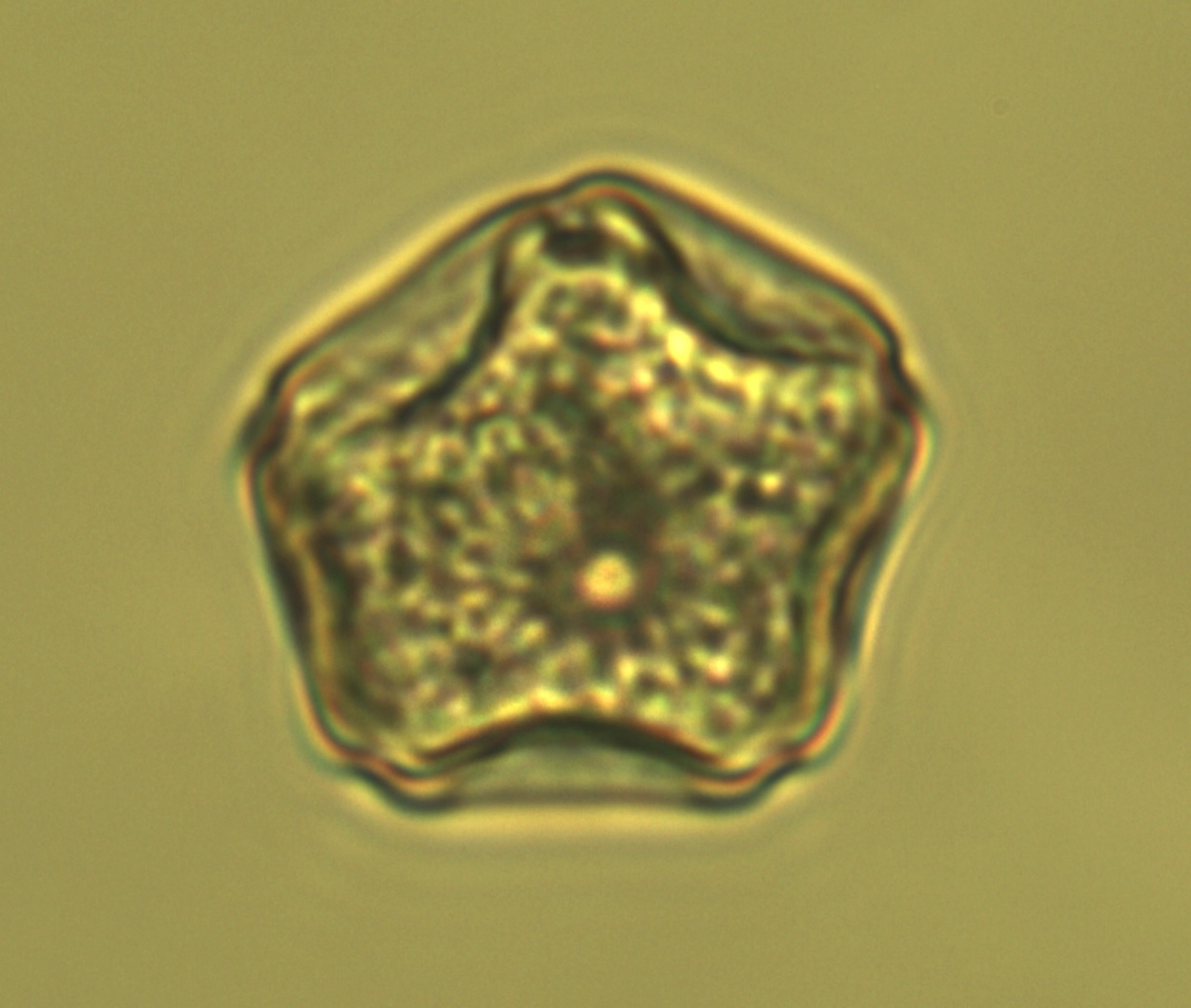 Alnus glutinosa Pollenkorn 400x